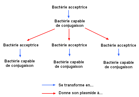 Auteur : Coockie Schéma illustrant la propagation de l'activation de la conjugaison dans une population bactérienne.